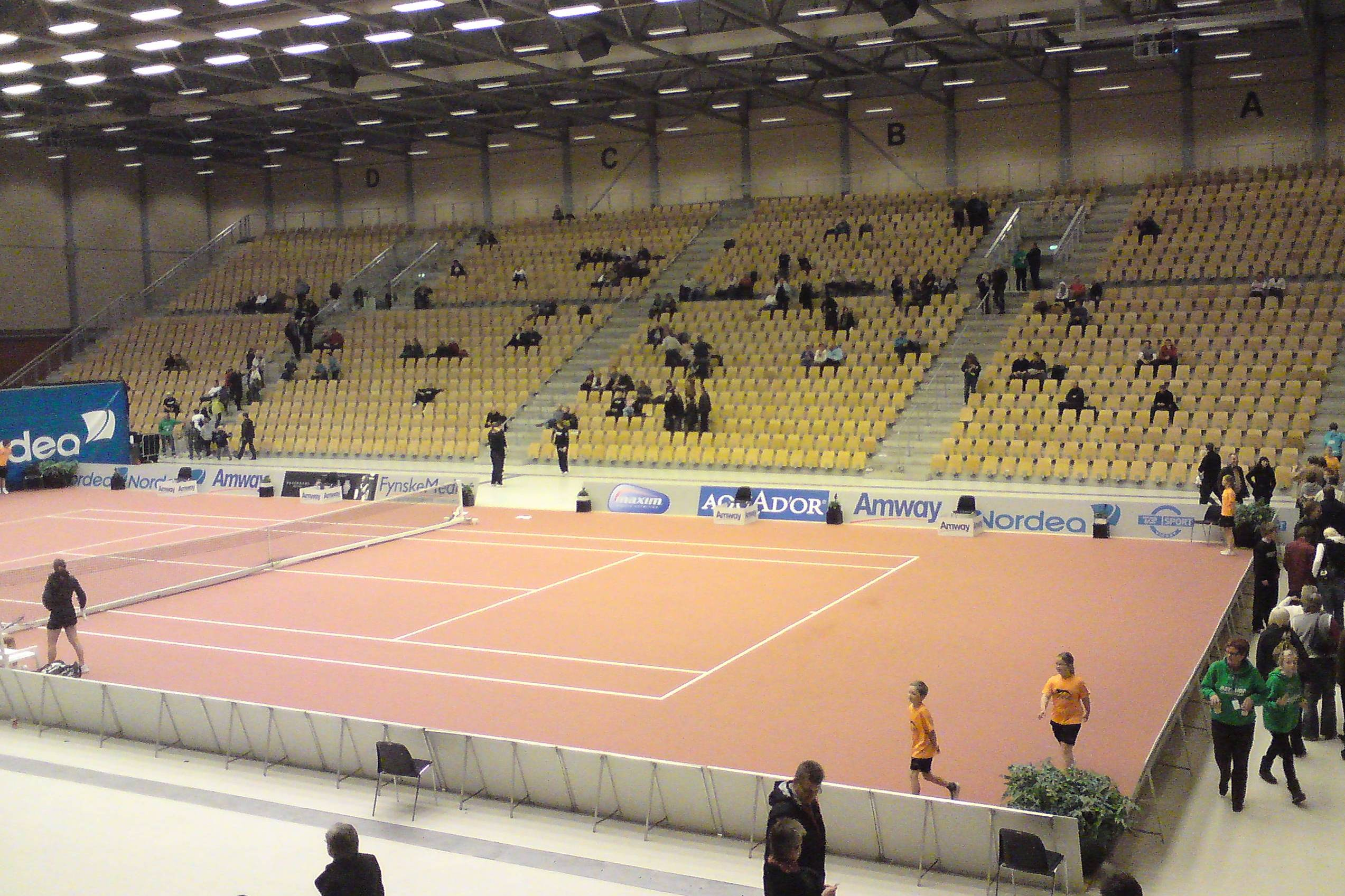 Arena Fyn under Danish Open 2008